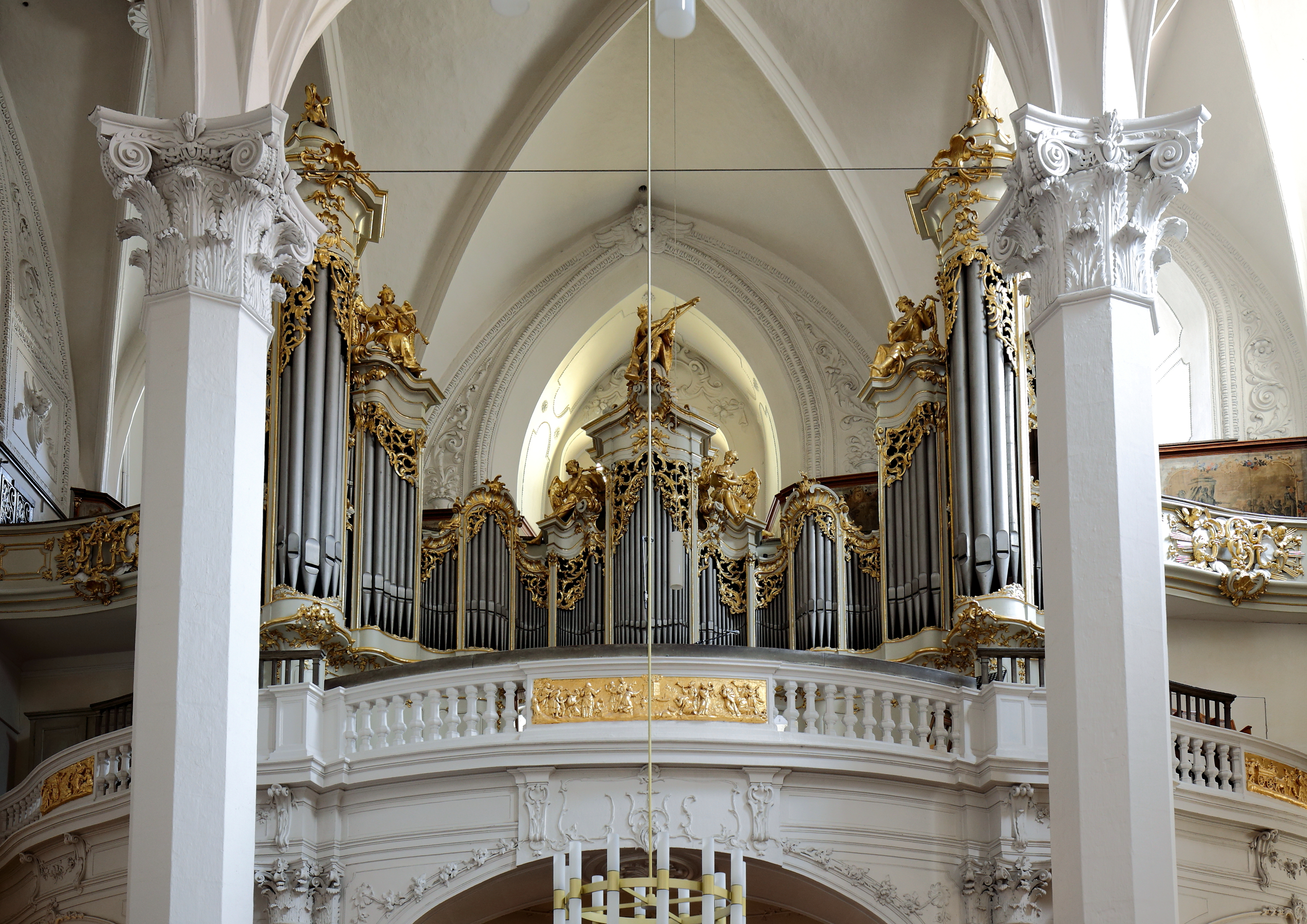 Orgel der Kirche am Hof, auch Kirche zu den neun Chören der Engel bezeichnet, im 1. Wiener Gemeindebezirk Innere Stadt.Die Orgel mit dem auffallend in die Breite entwickelten Gehäuse und seiner beschwingten, reich gegliederten Form wurde 1763 von einem unbekannten Orgelbauer errichtet; sie wird jedoch dem Hoforgelbauer Johann Friedrich Ferstl (um 1720–1785) zugeschrieben. Sie hat zwei Manuale, 24 Register und die Registratur sowie die Traktur sind mechanisch.